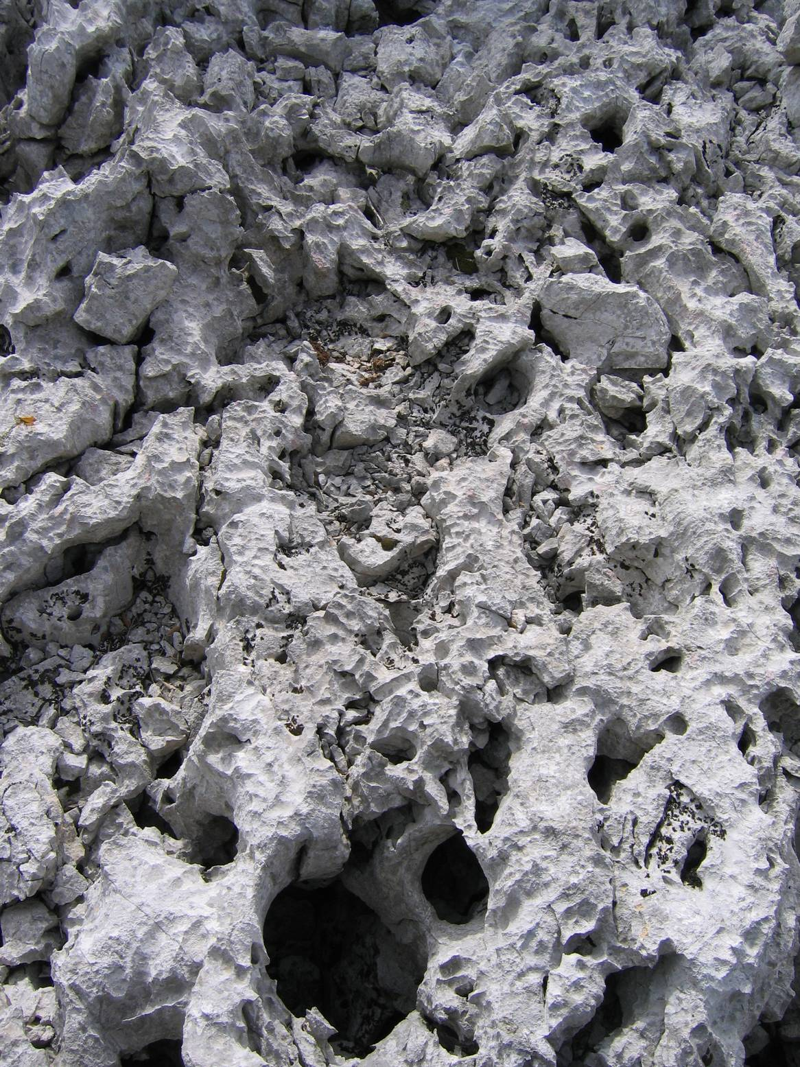 Description: Sol calcaire de type lapiazHérault, France Source: Hugo Soria Licence: GFDL Hugo Soria